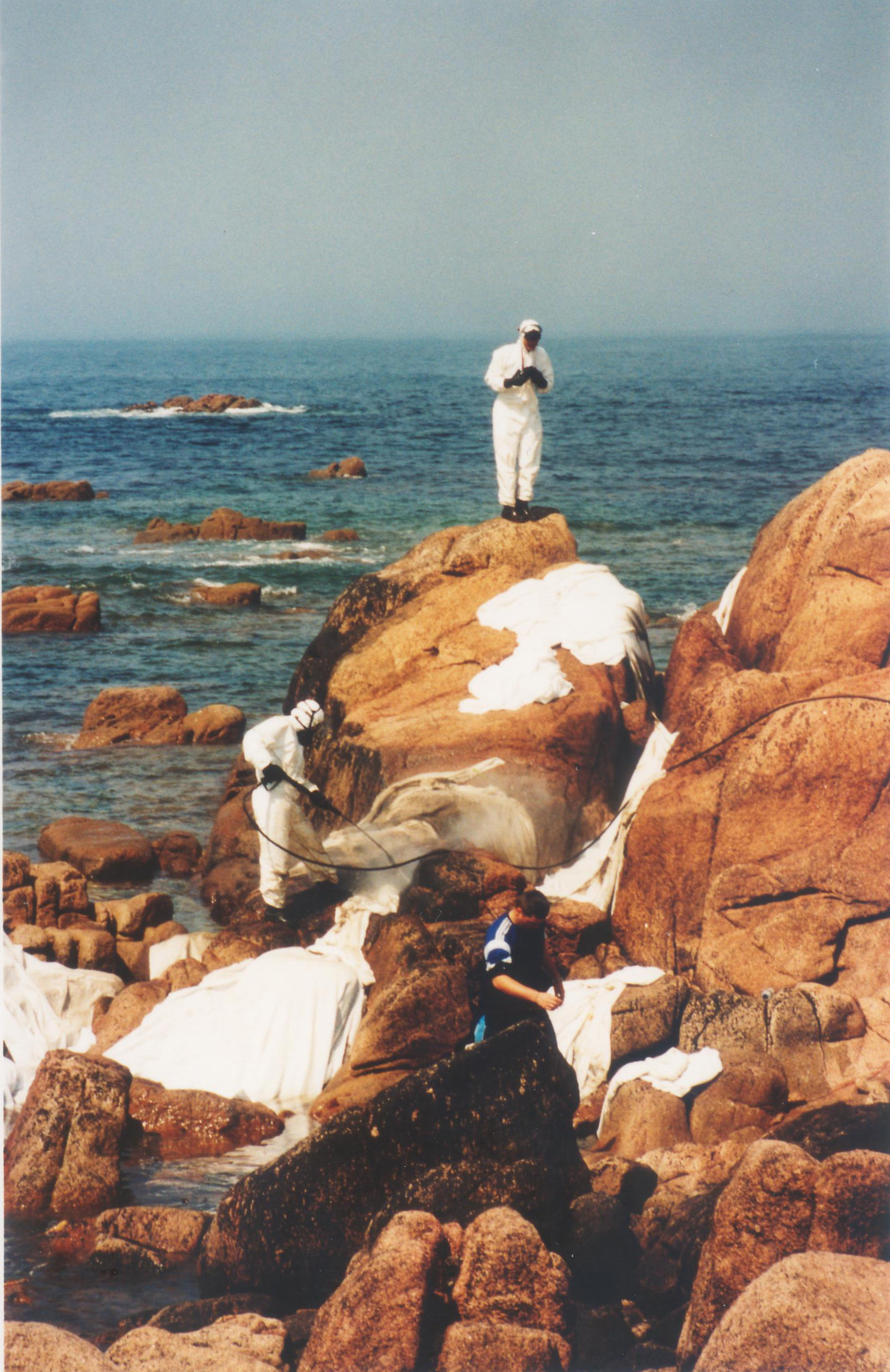 Limpeza de rochas en Laxe con máquinas hidrolimpadoras (primeiros de 2003)